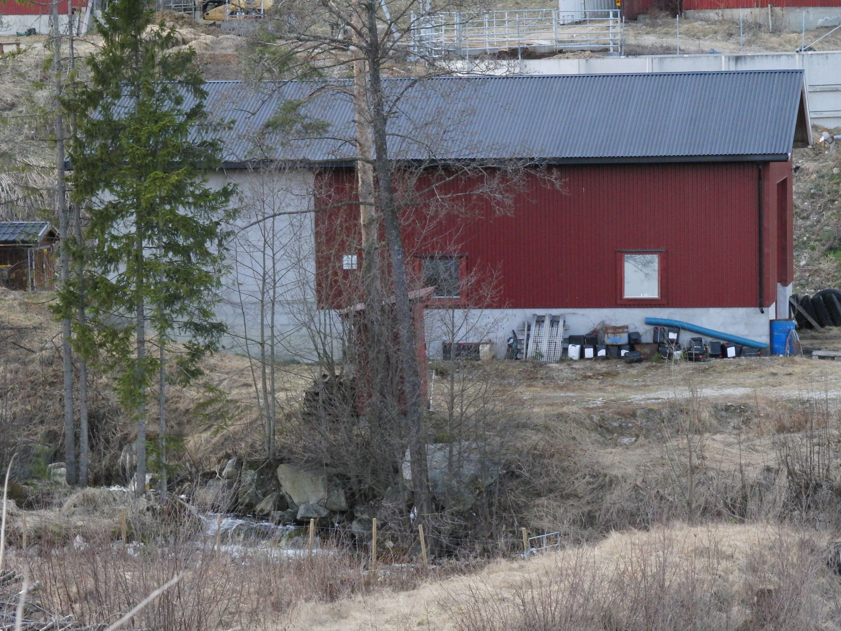 Strandeelva kraftverk